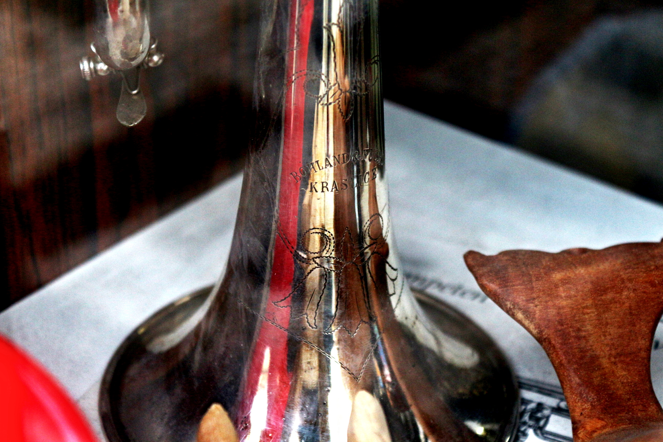 Trubka Bohland&Fusch Kraslice